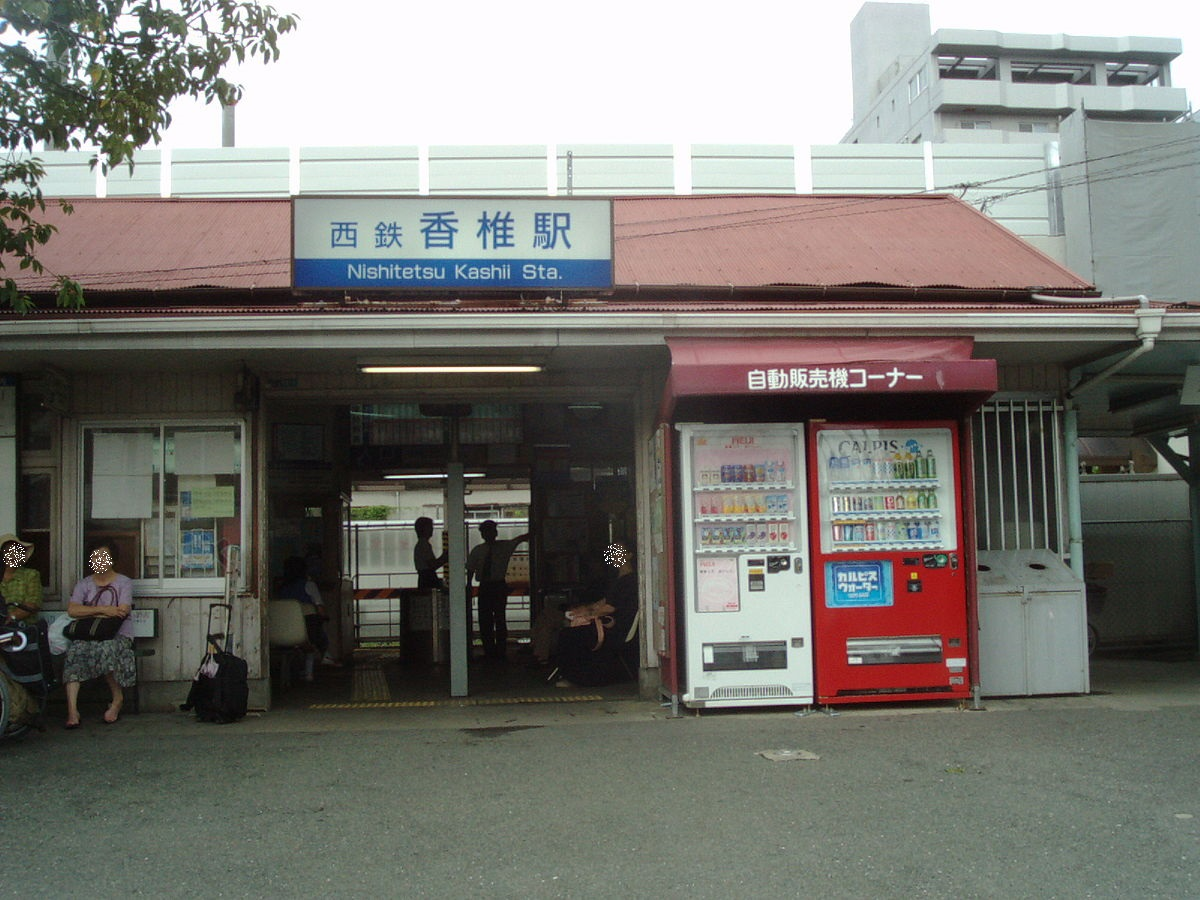 西鉄香椎駅 建て替え前の駅舎2015年2月21日 画像を編集し再投稿（プライバシーを配慮した編集）